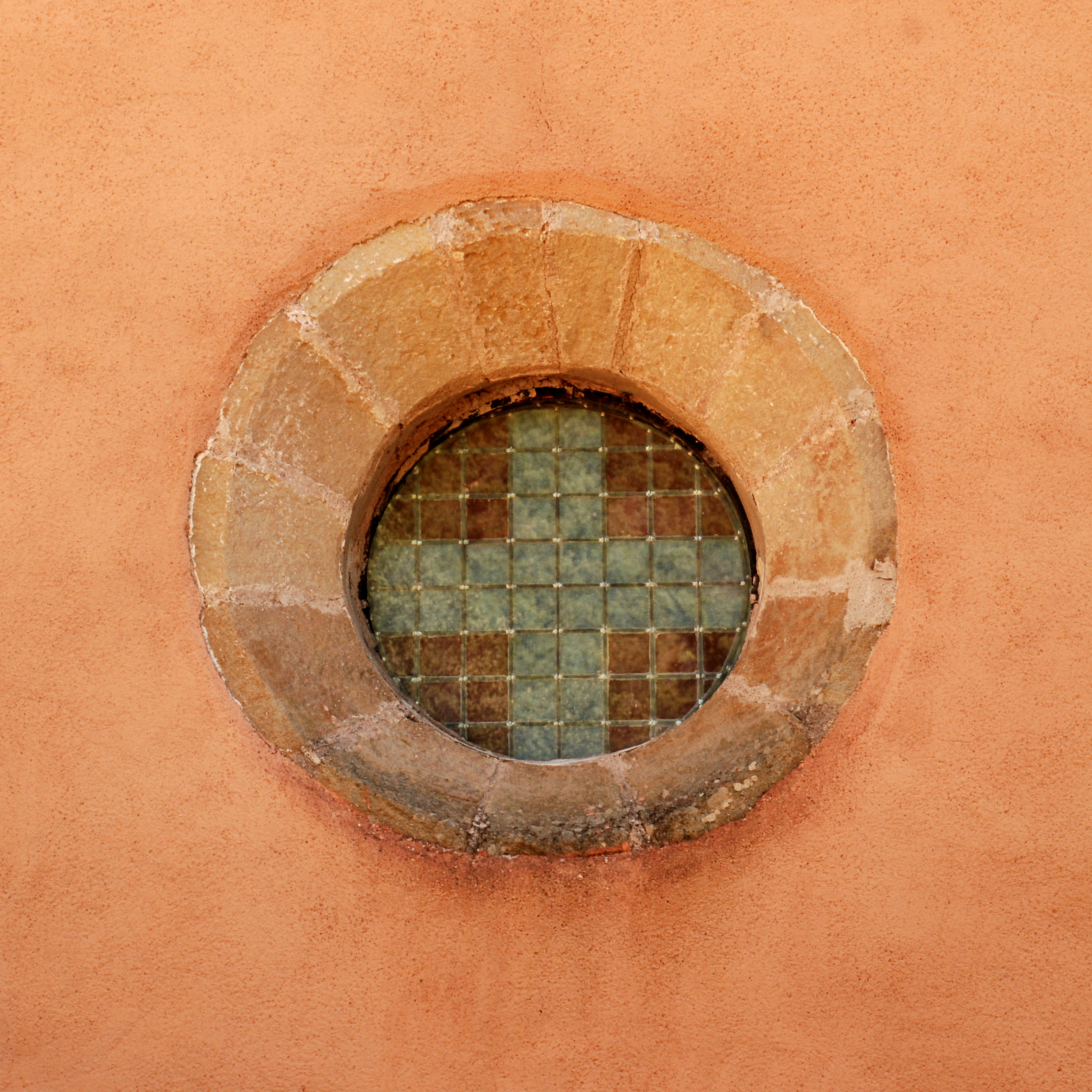 France - Languedoc - Hérault - La Tour-sur-Orb - Église Saint-Cyr et Sainte-Julite de Saint-Xist